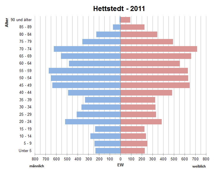 Bevölkerungspyramide der Stadt Hettstedt nach Zensus 2011.